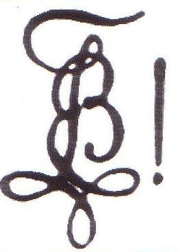 Zirkel der Wiener Landsmannschaft Bukowina (1868-1882)